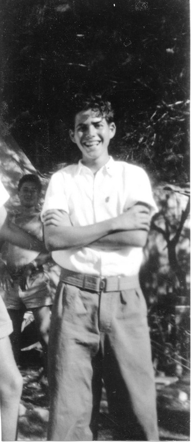 חטיבת יפתח - הגדוד הראשון - הכשרות - פלוגה ד - 2 - הכשרת בית-השיטה – פלוגה ד' - הגרעין בקיבוץ גבת – ראשונים בקיבוץ. מנחם גפן